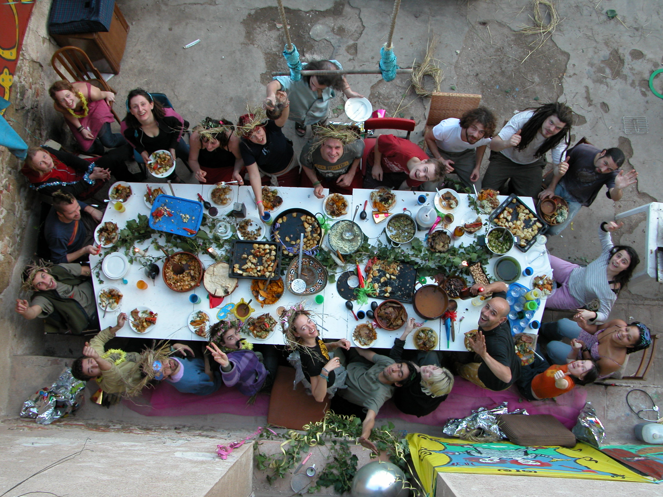 Compartimos la comida y la cena todos los dias, solemos ser entre 15 y 35 para comer.